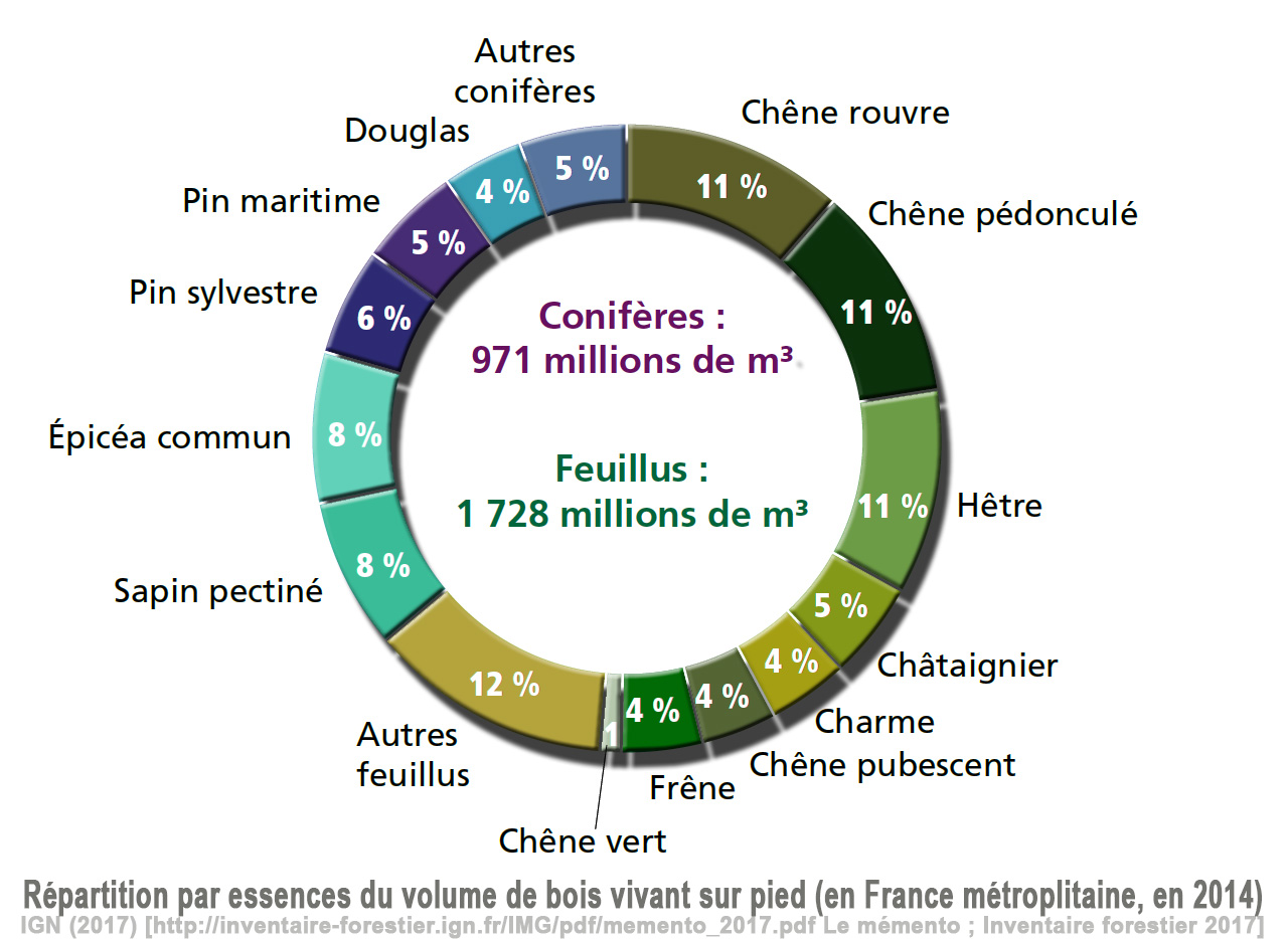 Forêt française : répartition de la ressource en bois distribuée par essences (estimation) d'après données et graphiques 2014 collectées par l'IGN et publiés en 2017 (IGN (2017) Le mémento ; Inventaire forestier 2017)